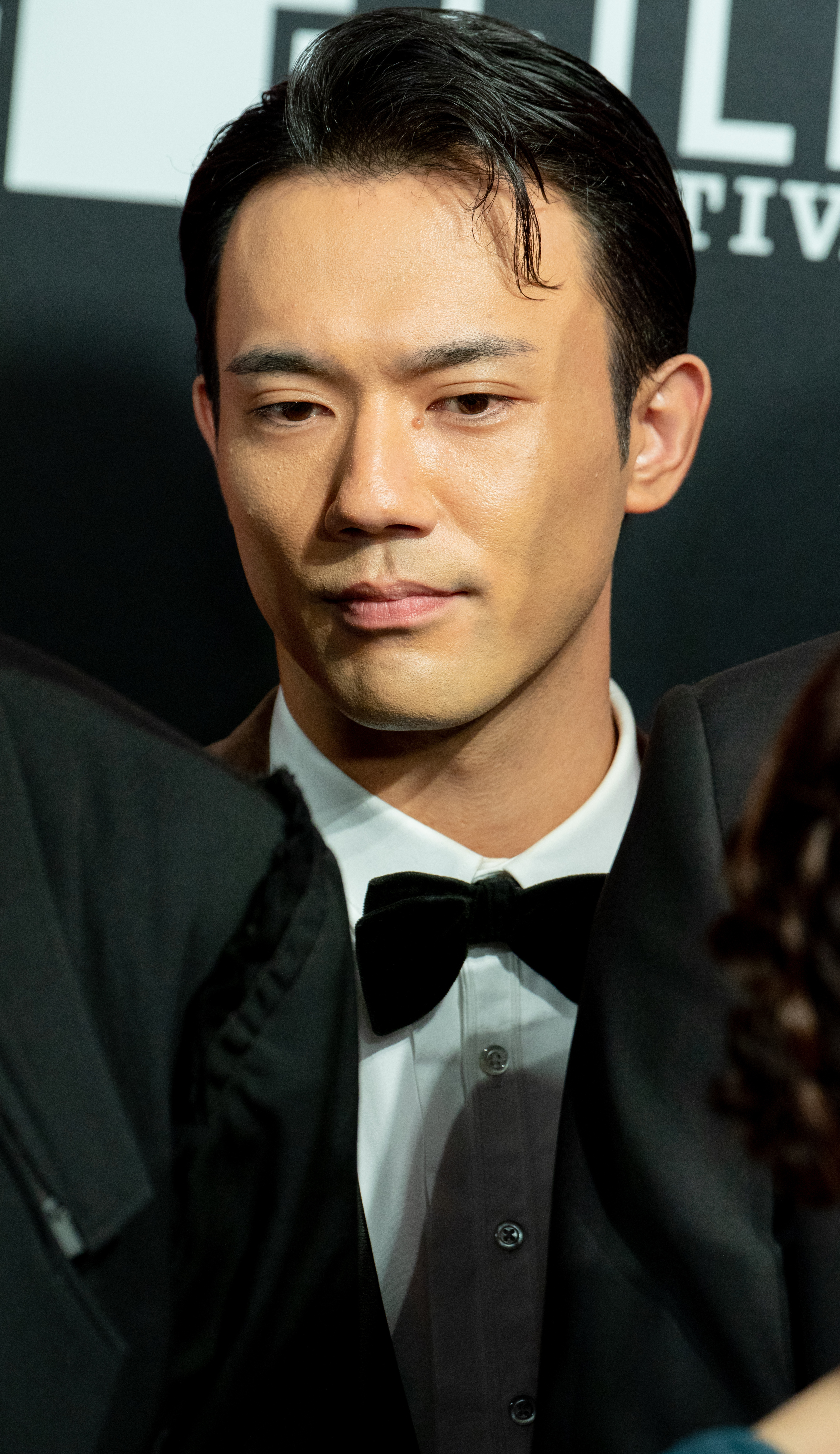 第30回 東京国際映画祭 オープニングセレモニー 小澤雄太 (jam)